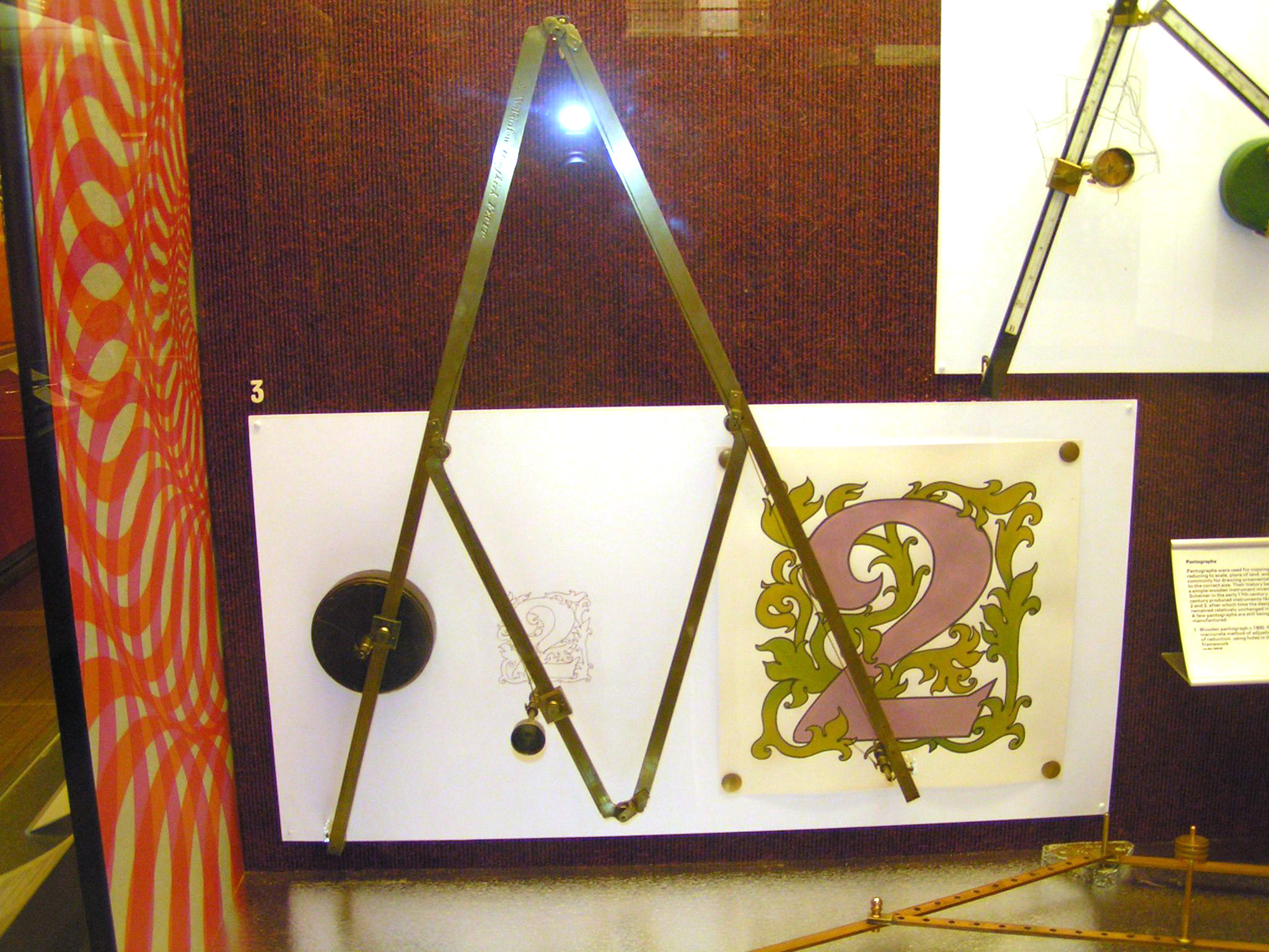 Pantograf